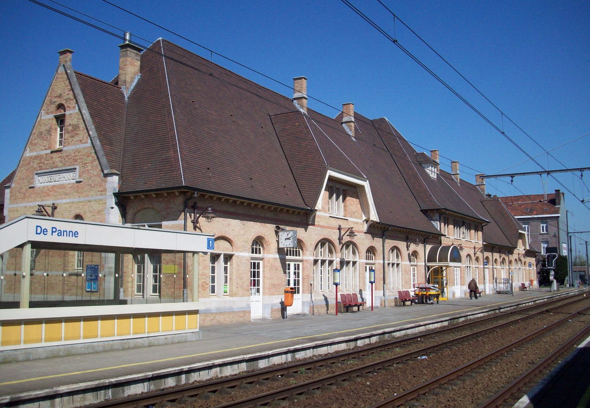 Station De Panne